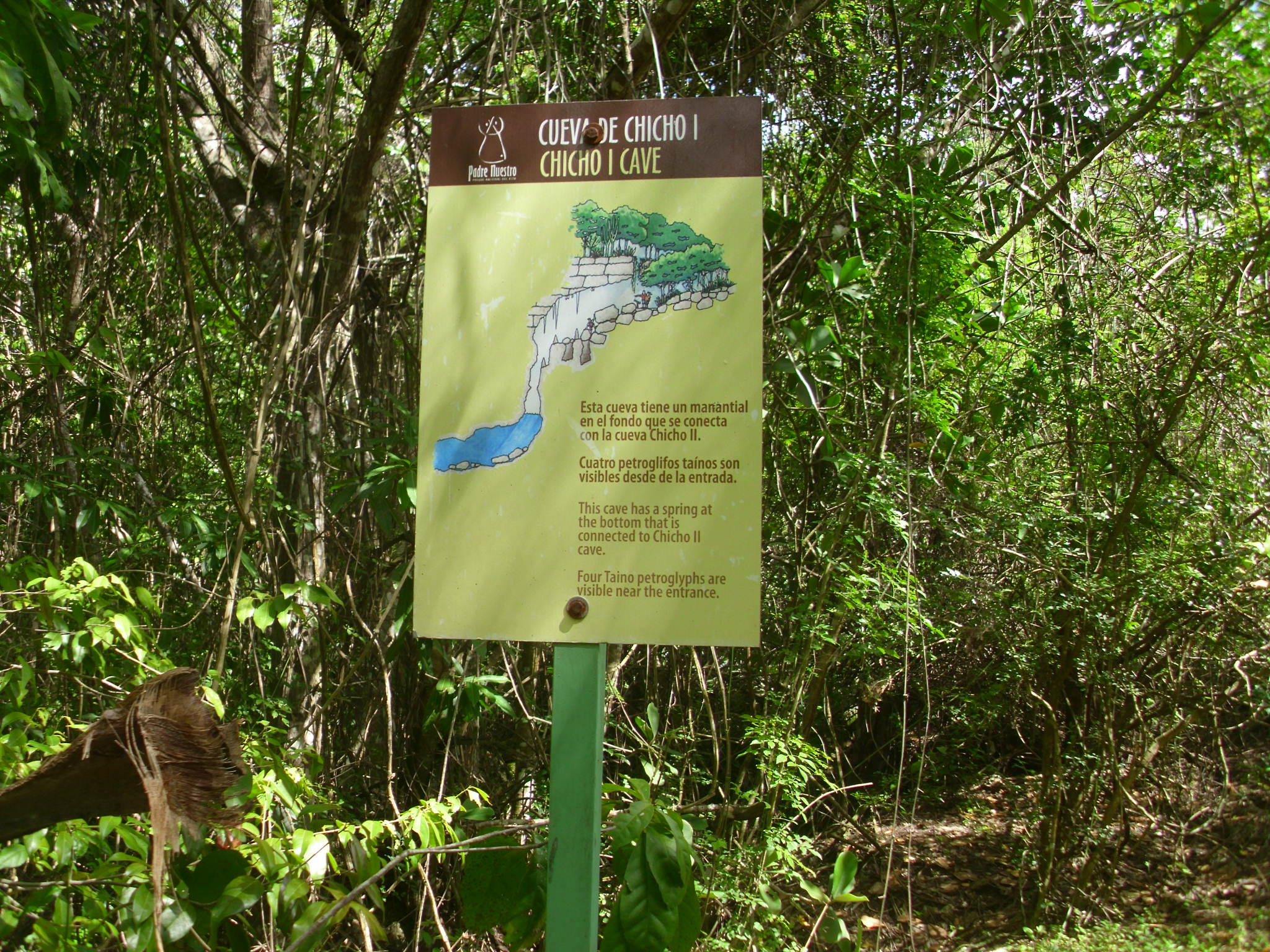 Taïno grotten bij Bayahibe Republica Dominicana